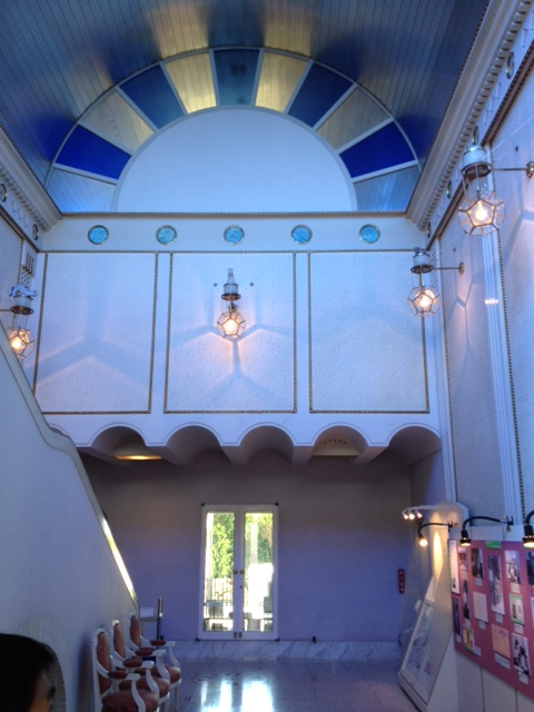 大佛次郎記念館の階段部分のホール。